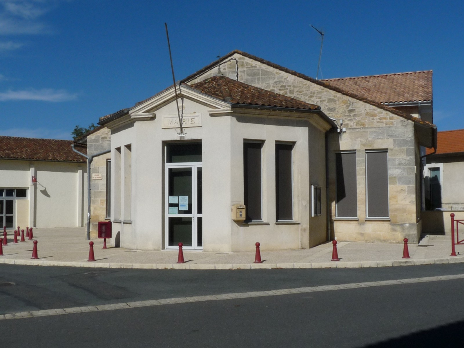 Mairie de Saint-Mariens, Gironde, France